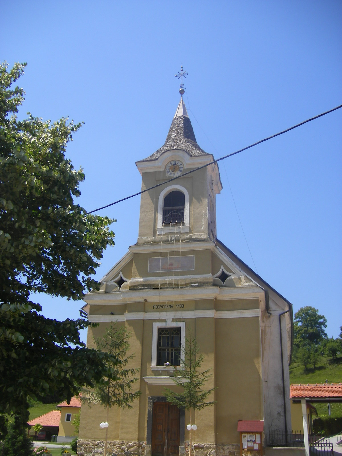 Frankolovo (municipality Vojnik)